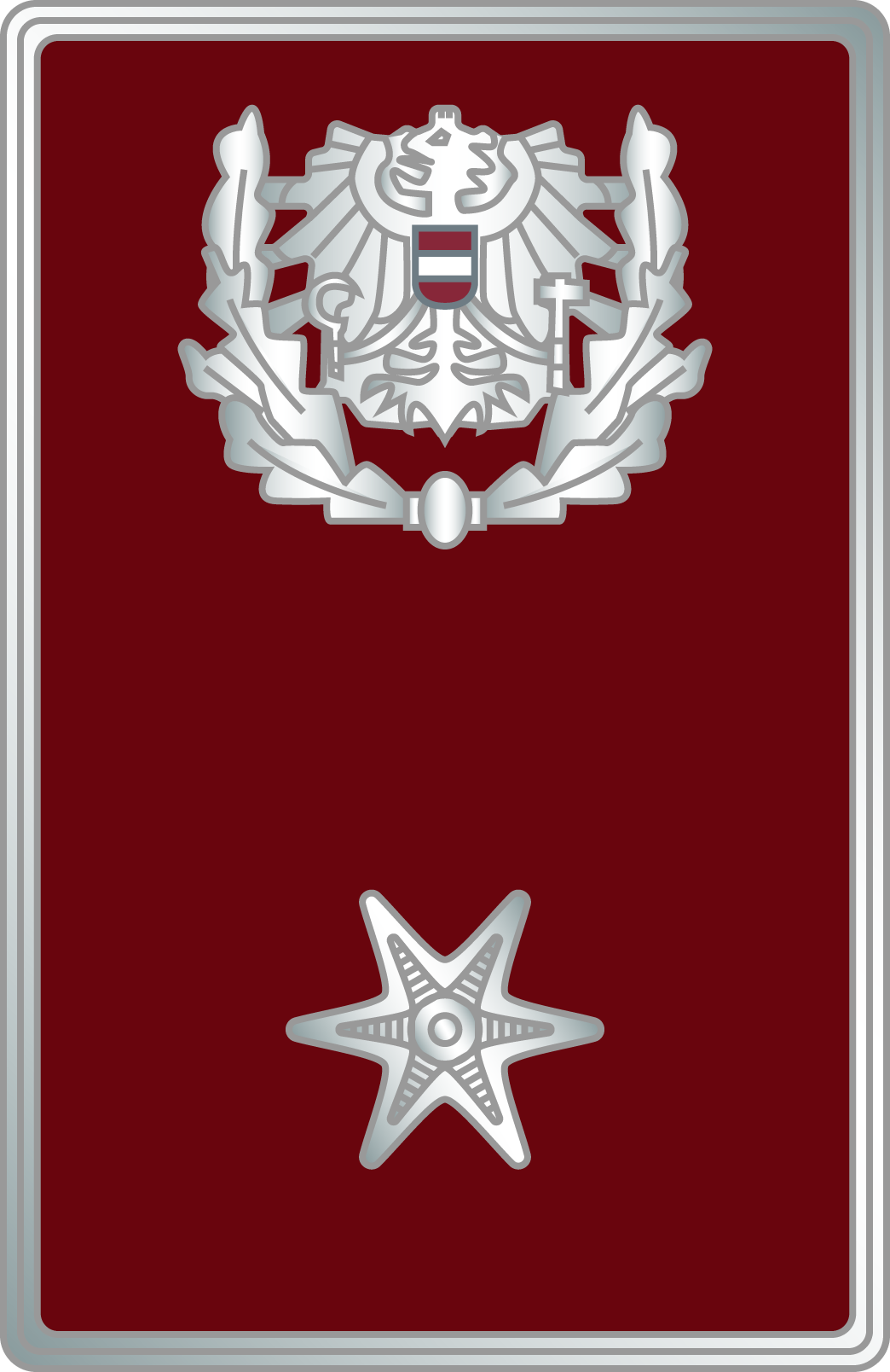 Aufschubdistinktionen eines Inspektors der österreichischen Bundespolizei